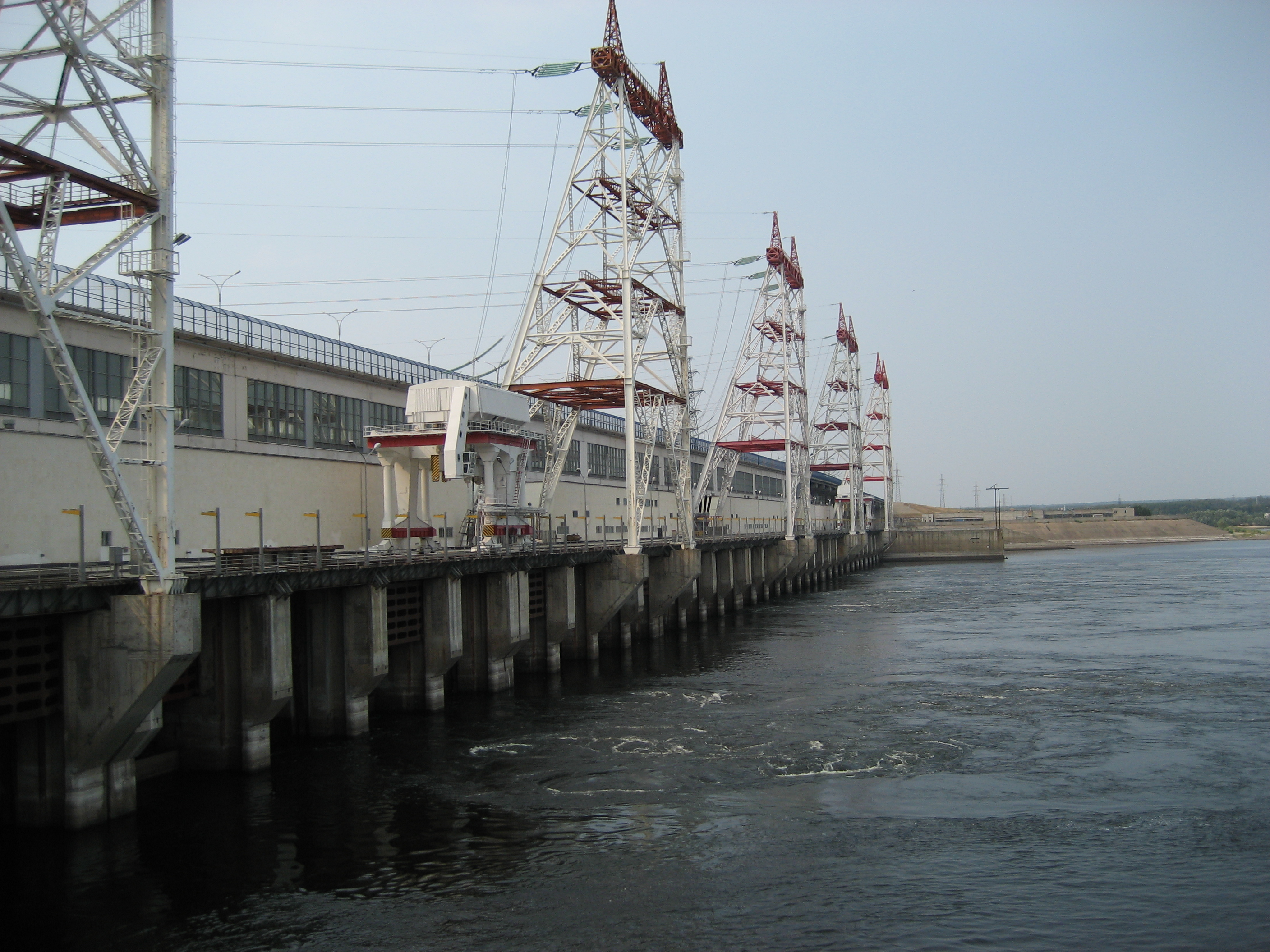 Здание Чебоксарской ГЭС, вид с нижнего бьефа